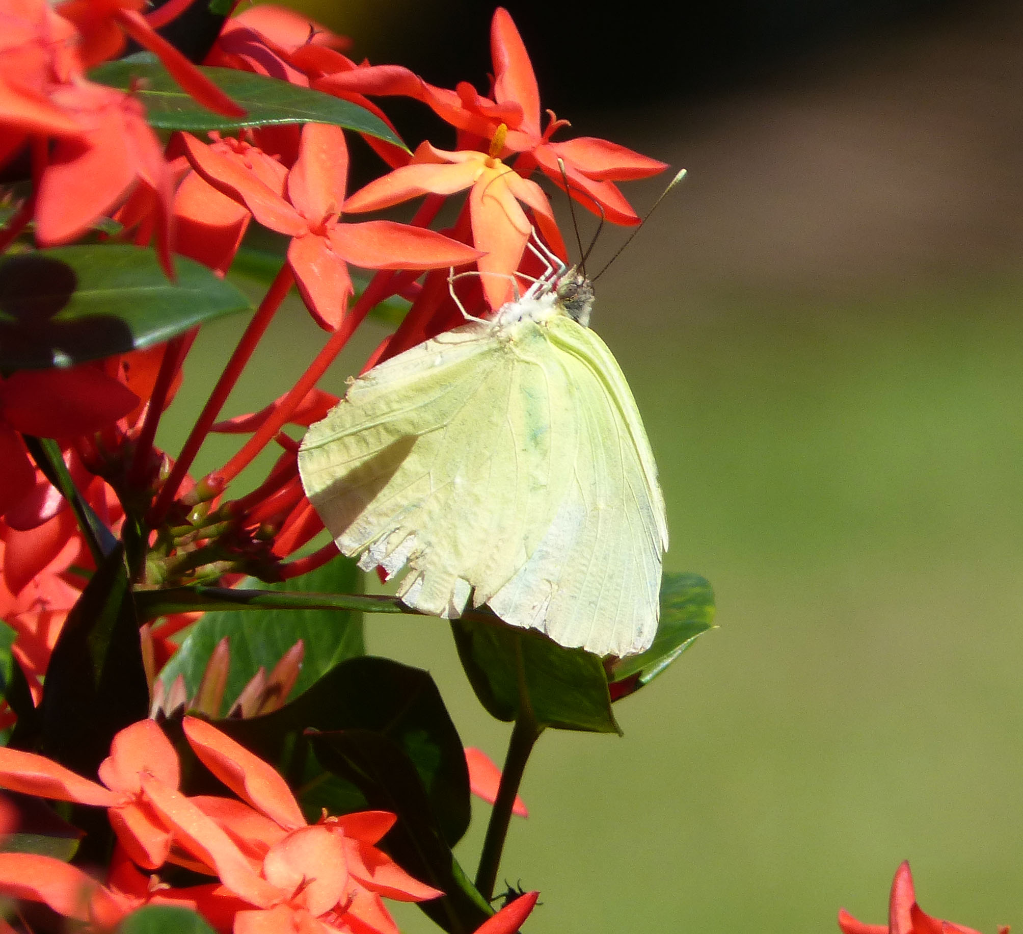 La Guira N. P, Western Cuba.